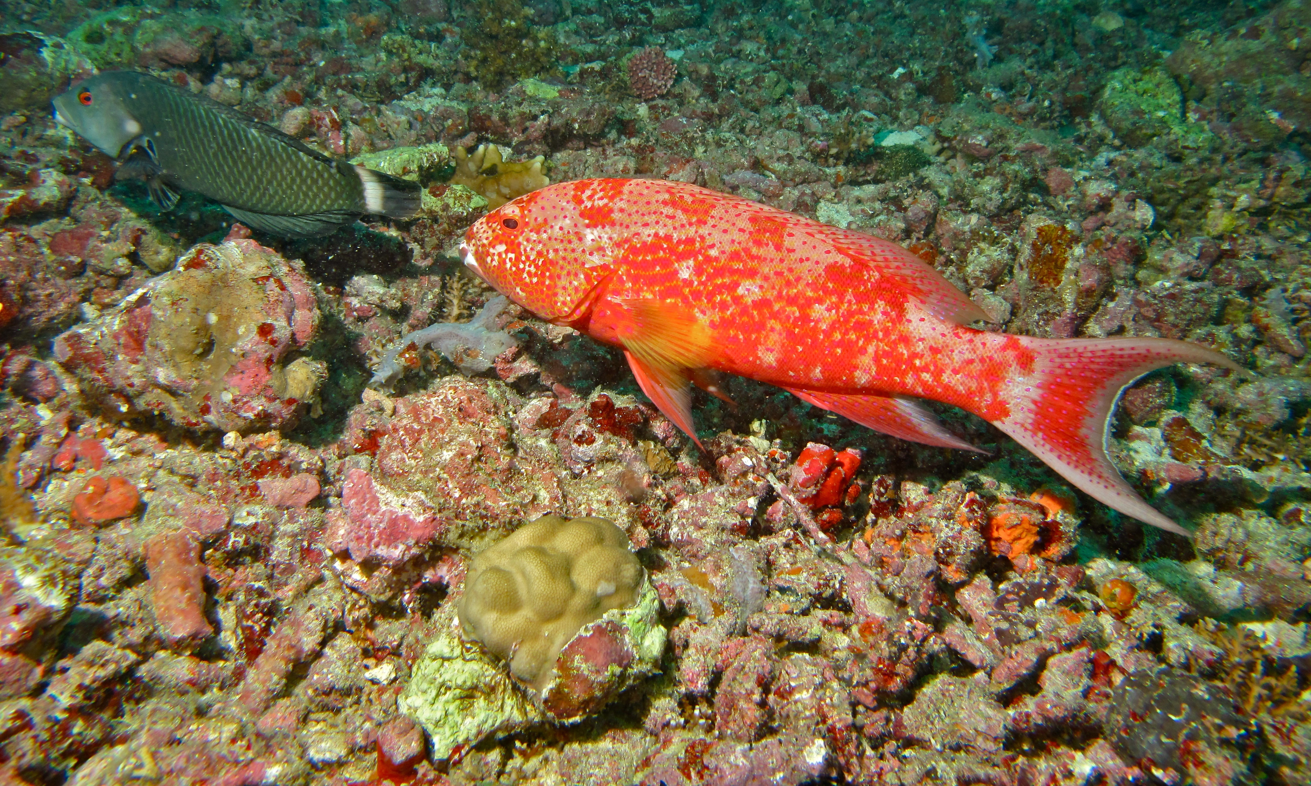 Barracuda Point, Pulau Sipadan, Sabah, MALAYSIA